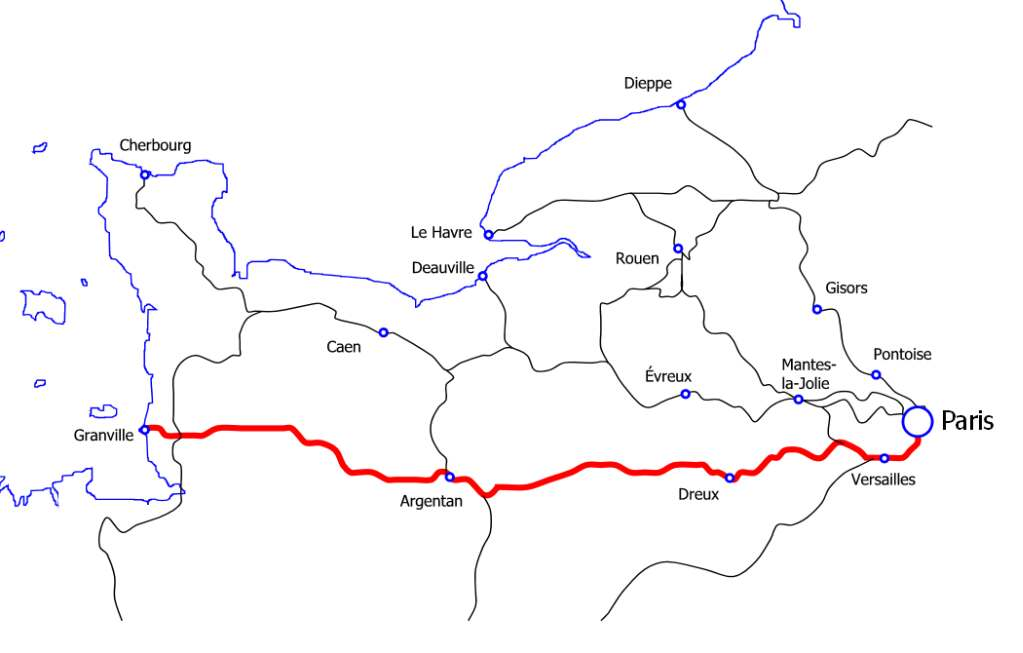 Carte Paris-Granville Essai personnel